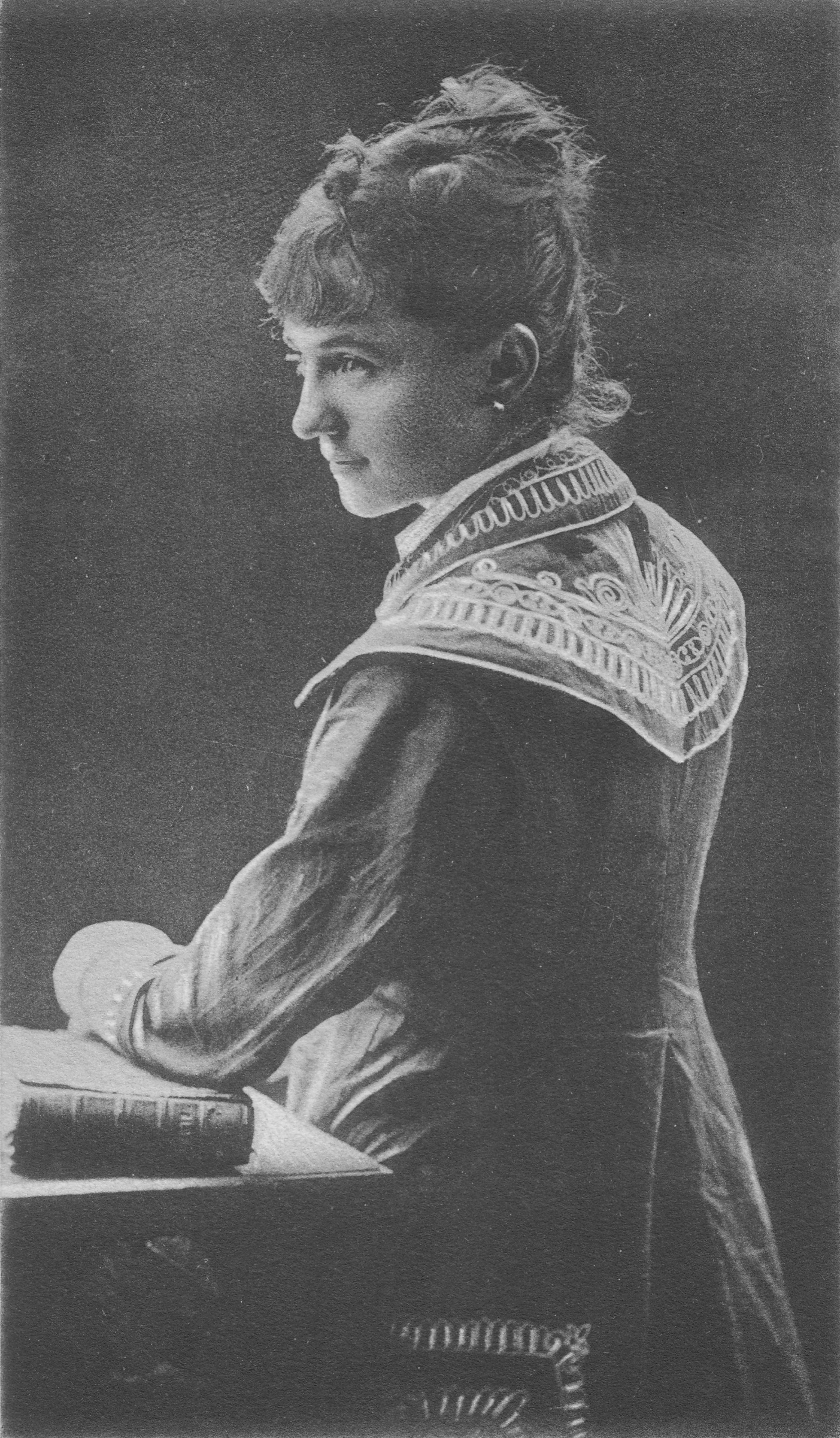 Marie Kalašová. Fotografie J. Mulače v Praze 1878